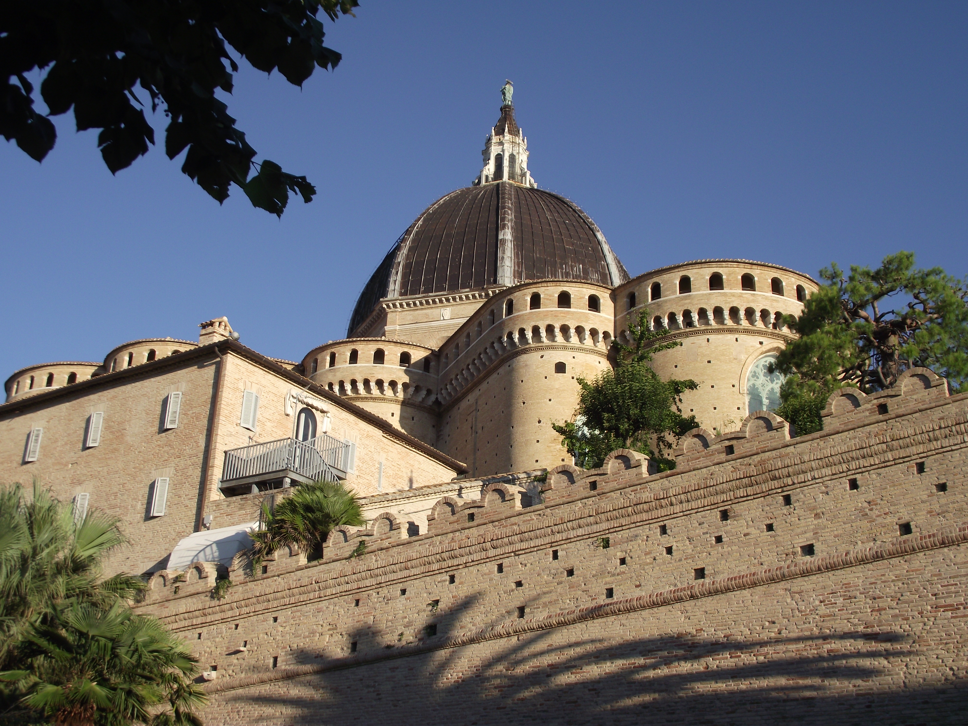 Cinta muraria, 1518-22